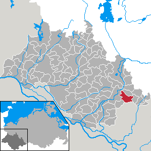 Prislich in Mecklenburg-Vorpommern - district Ludwigslust